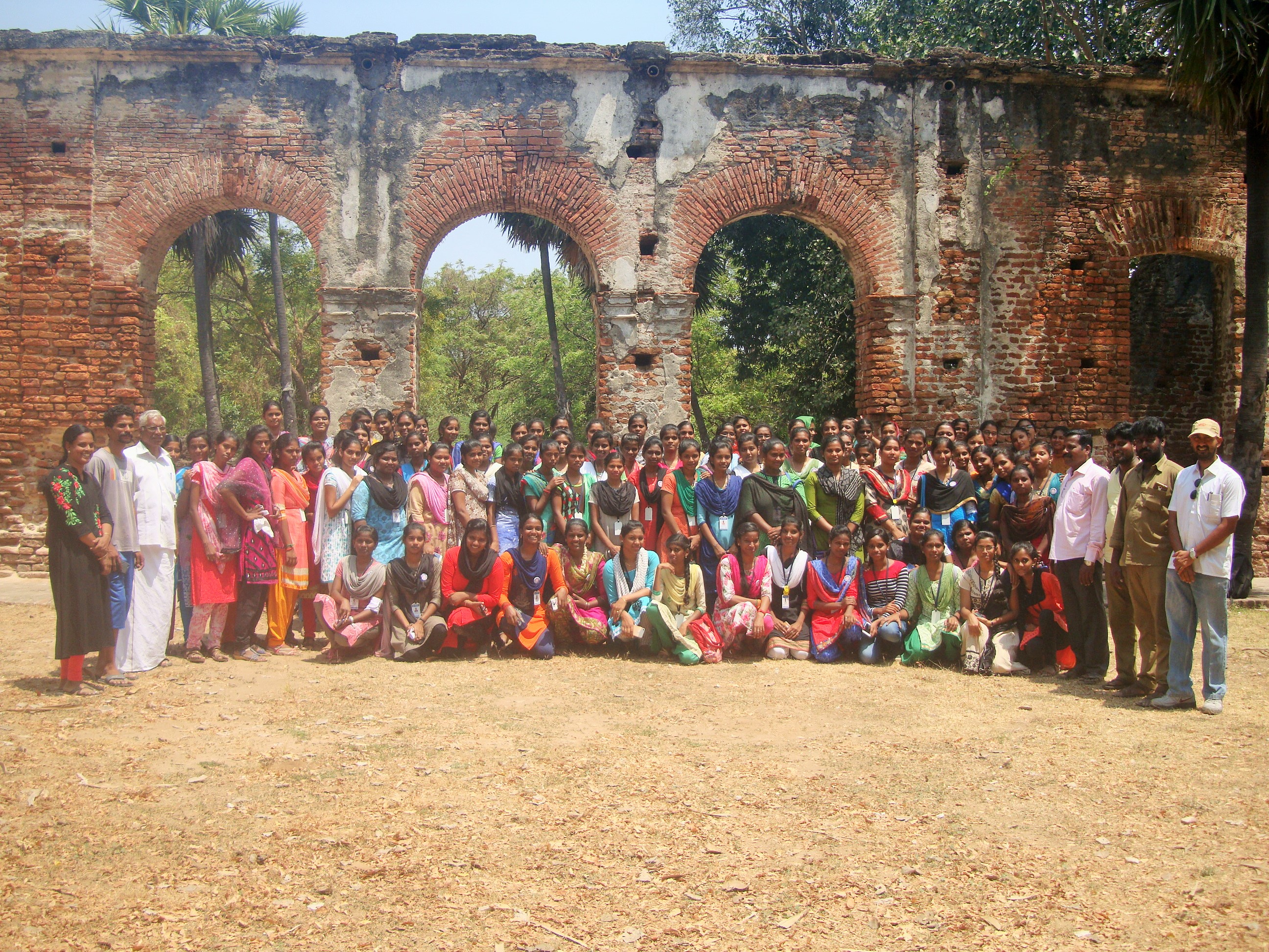 புதுச்சேரி அரிக்கமேடு அகழாய்வுப் பகுதியில் புதுச்சேரி பாரதிதாசன் மகளிர் கல்லூரி நாட்டு நலப்பணித்திட்ட மாணவியர்களுக்காக புதுவை அருங்காட்சியக நிறுவனர்கருத்துரை வழங்கிய பின்னர் எடுத்துக் கொண்டக் குழுப்படம்